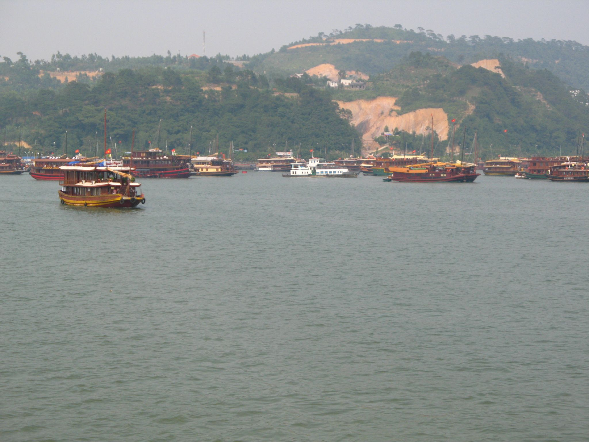 An island in Ha Long Bay.